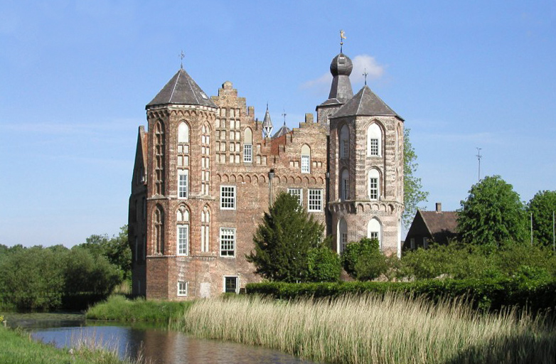 Castle Croy, Laarbeek, The Netherlands